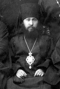 Архиепископ Серафим (Лукьянов)